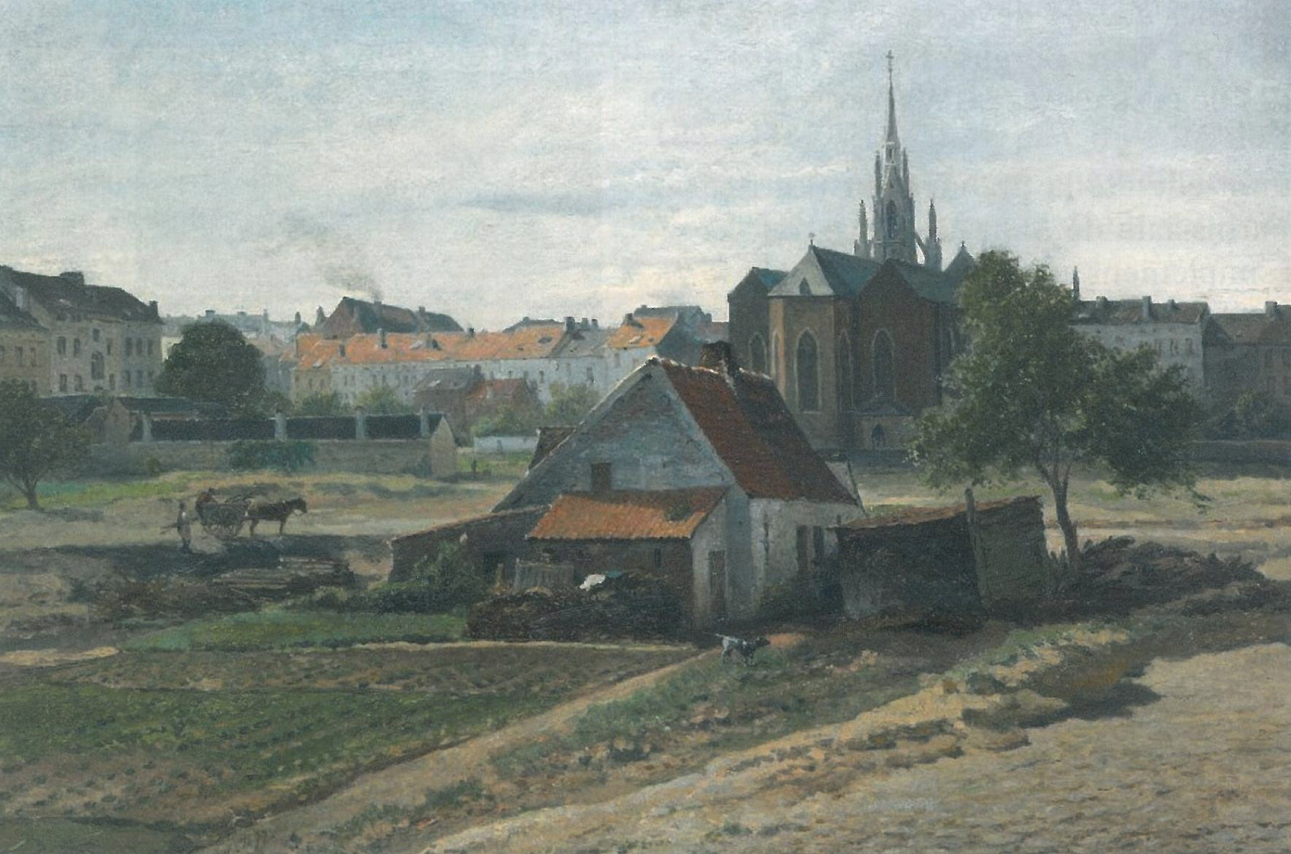 Peinture